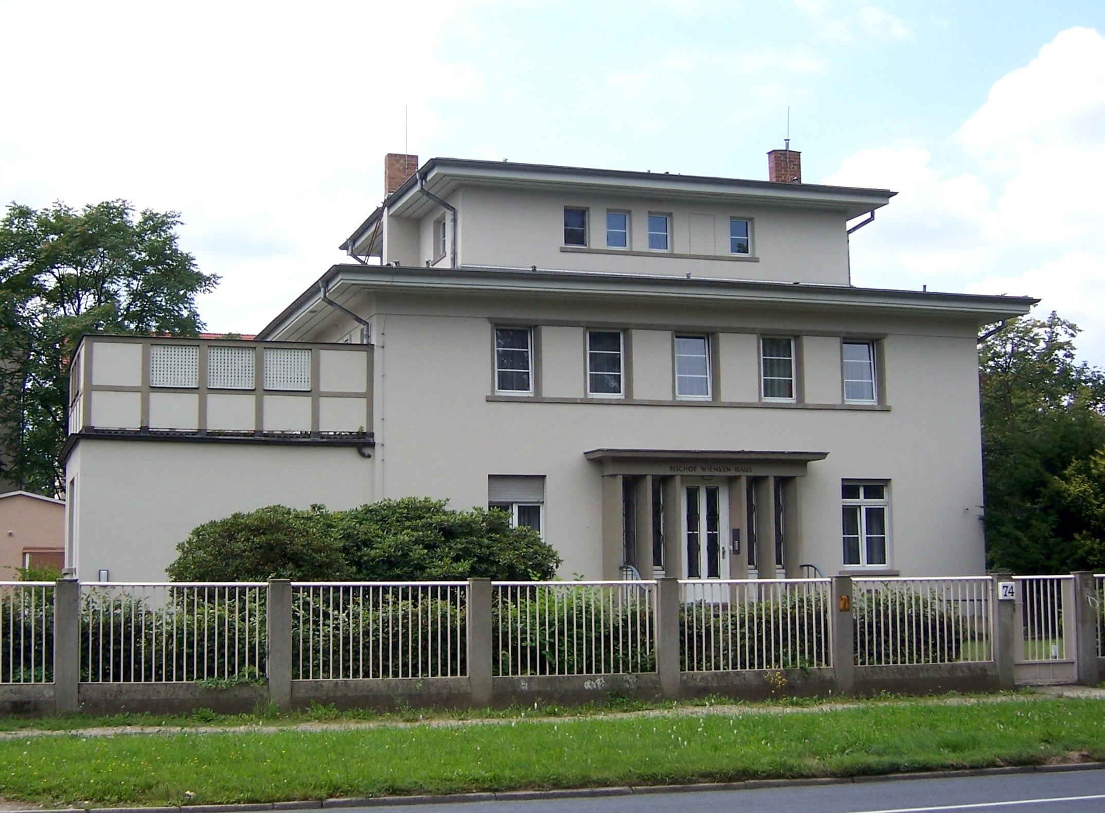 Bischof-Wienken-Haus auf der Tiergartenstraße am Großen Garten in Dresden-Strehlen